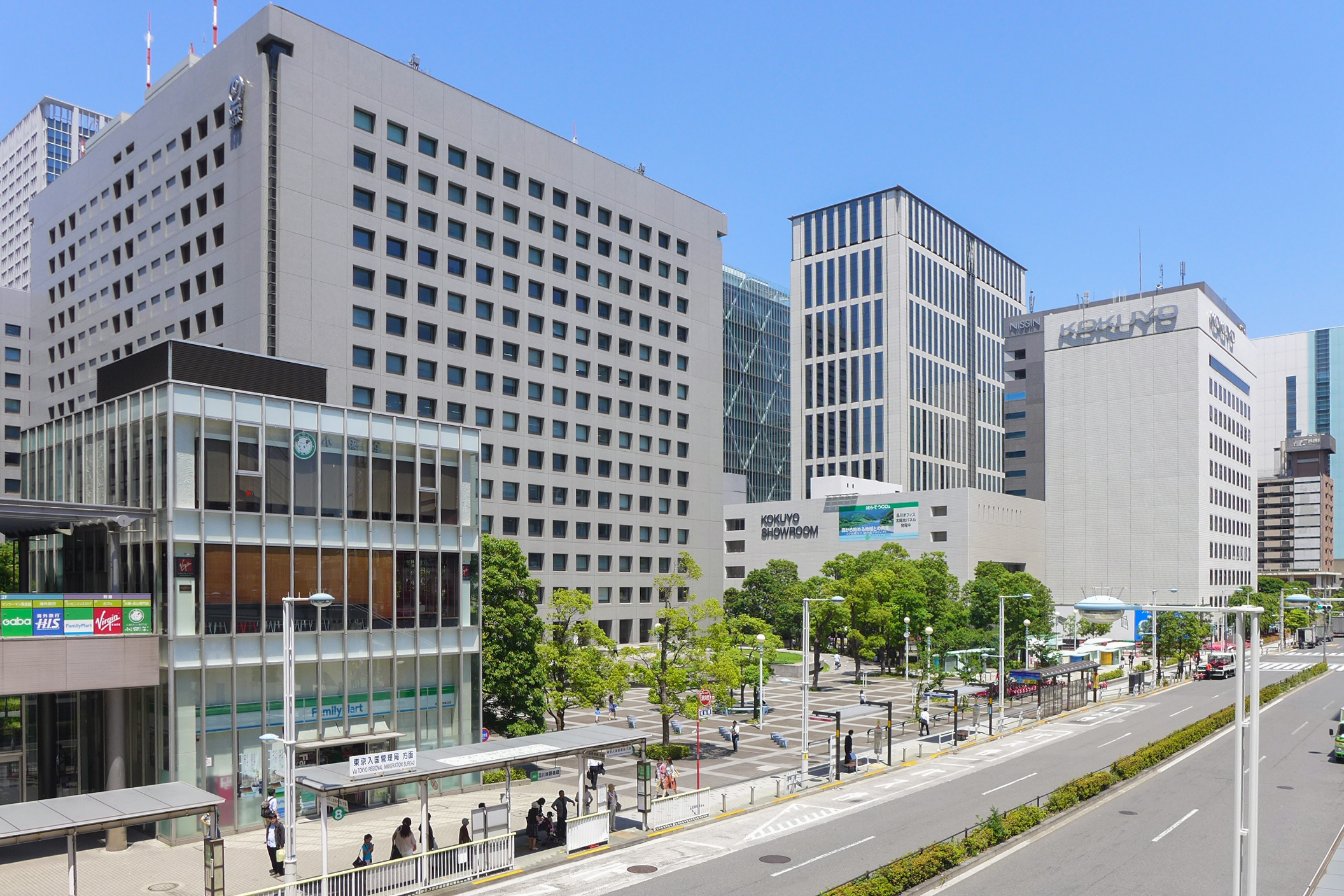 NTT Shinagawa